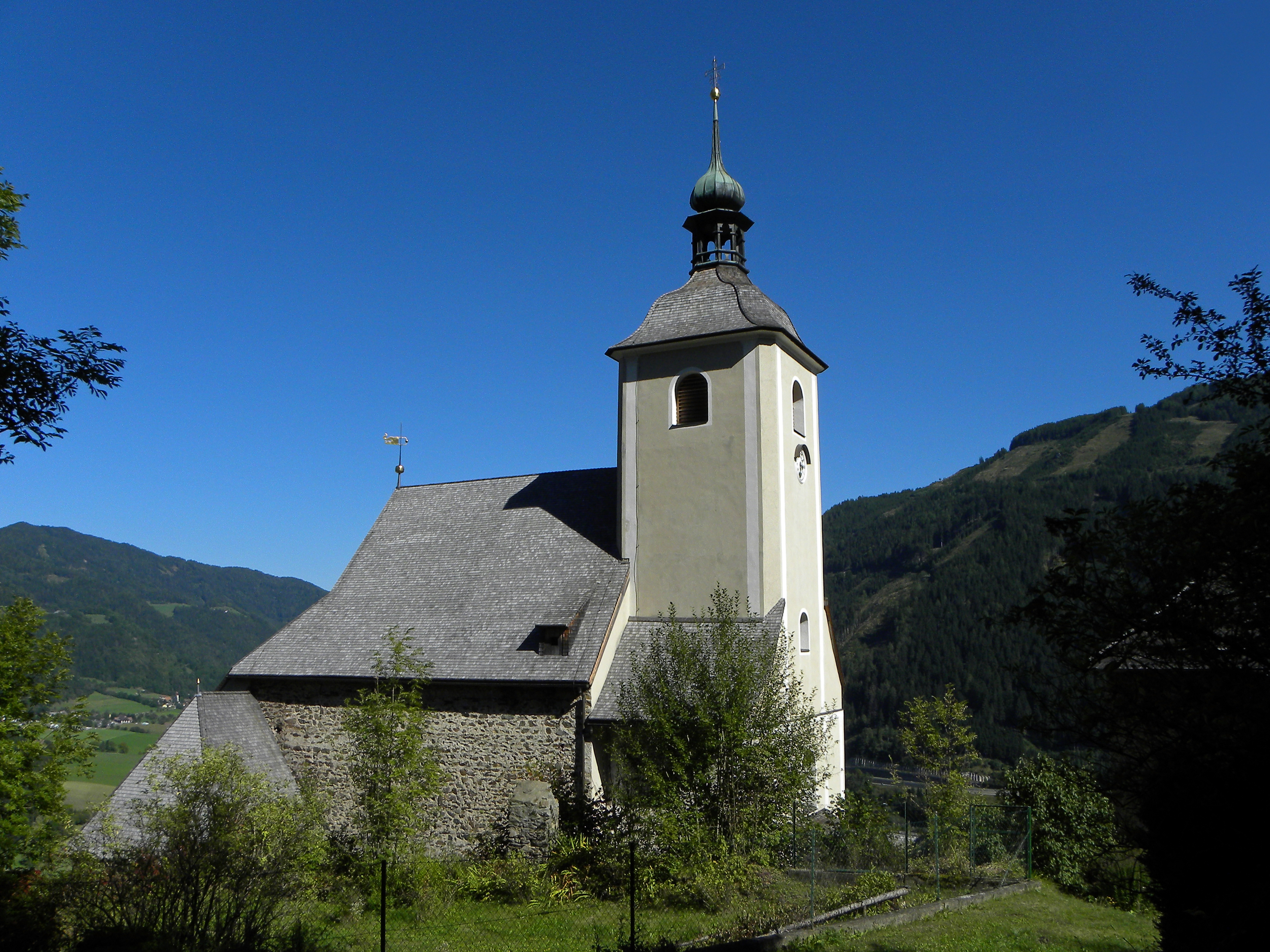 Kath. Pfarrkirche hl. Jakob der Ältere und Friedhof